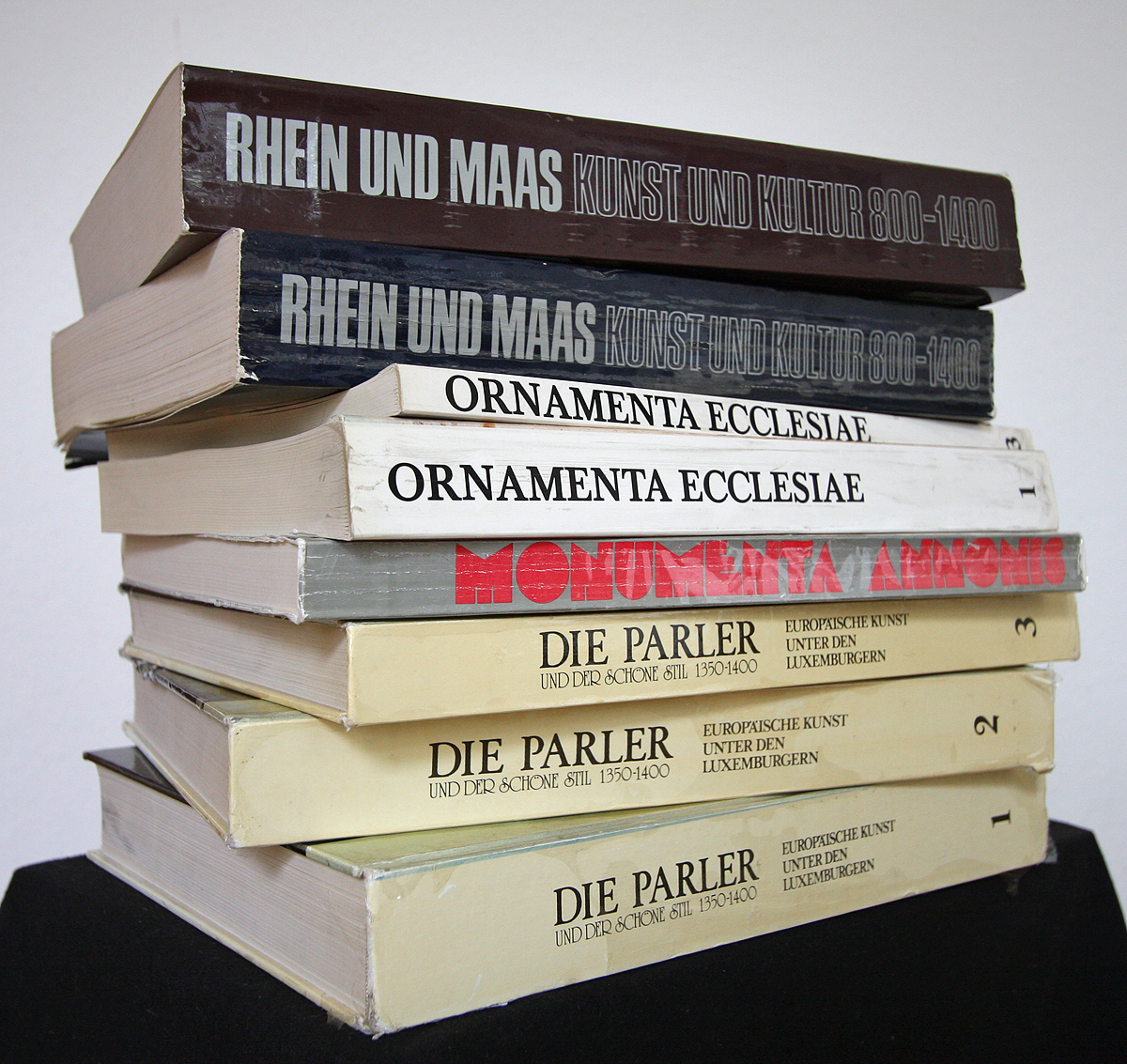 Ausstellungskataloge von bekannteren Ausstellungen des Museums Schnütgen in Köln